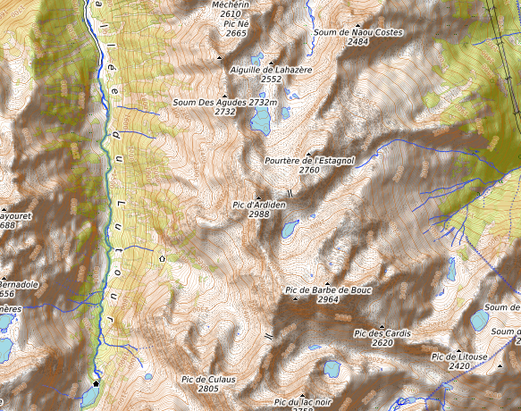 carte réalisée sur umap This map may be incomplete, and may contain errors. Don't rely solely on it for navigation.